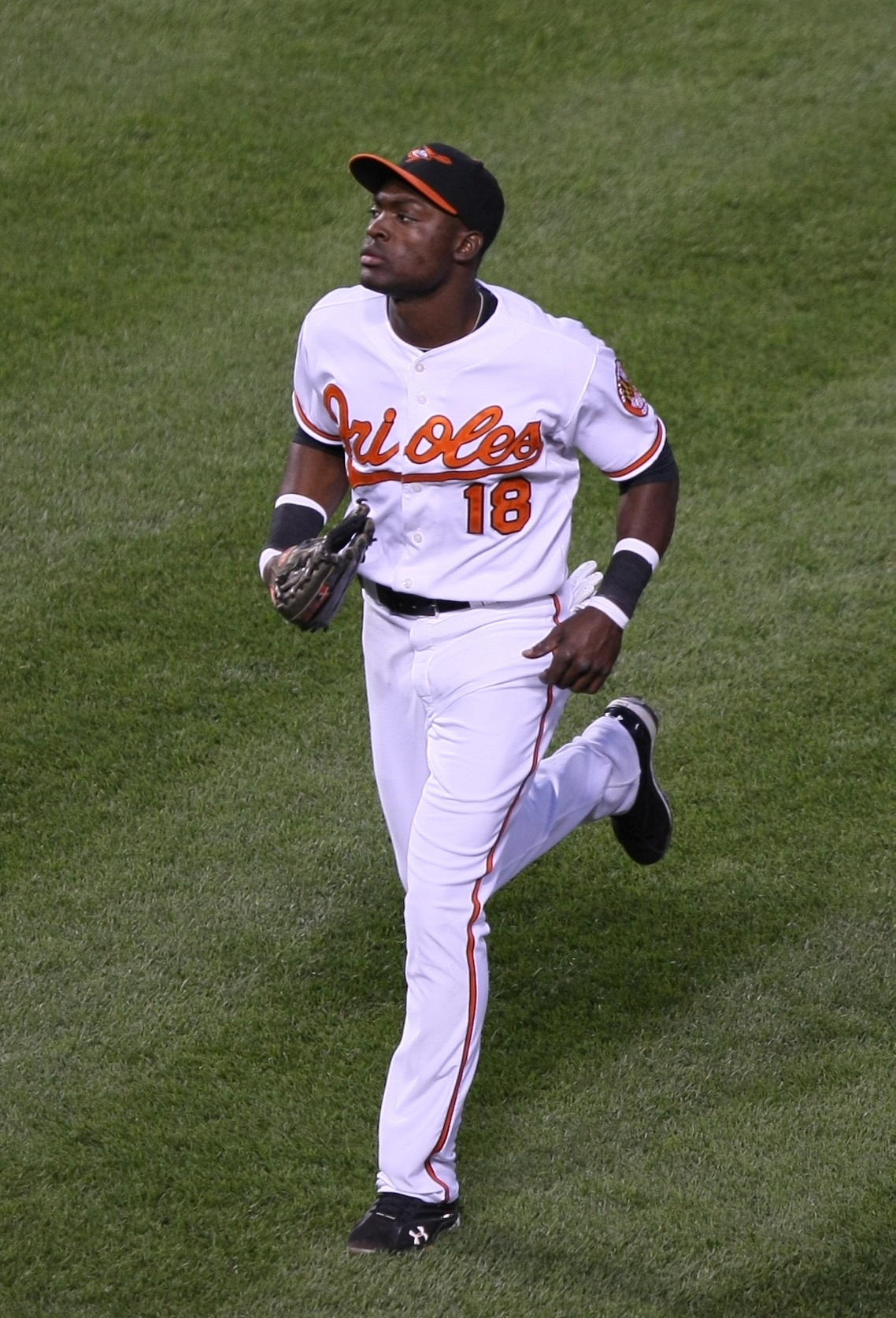 Félix Pie